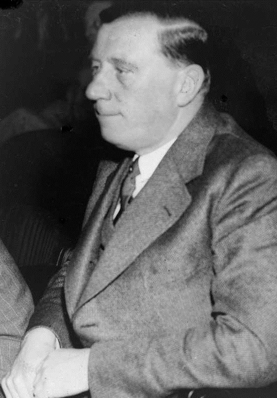 portrett, mann, redaktør for Nationen, sittende halvfigur.